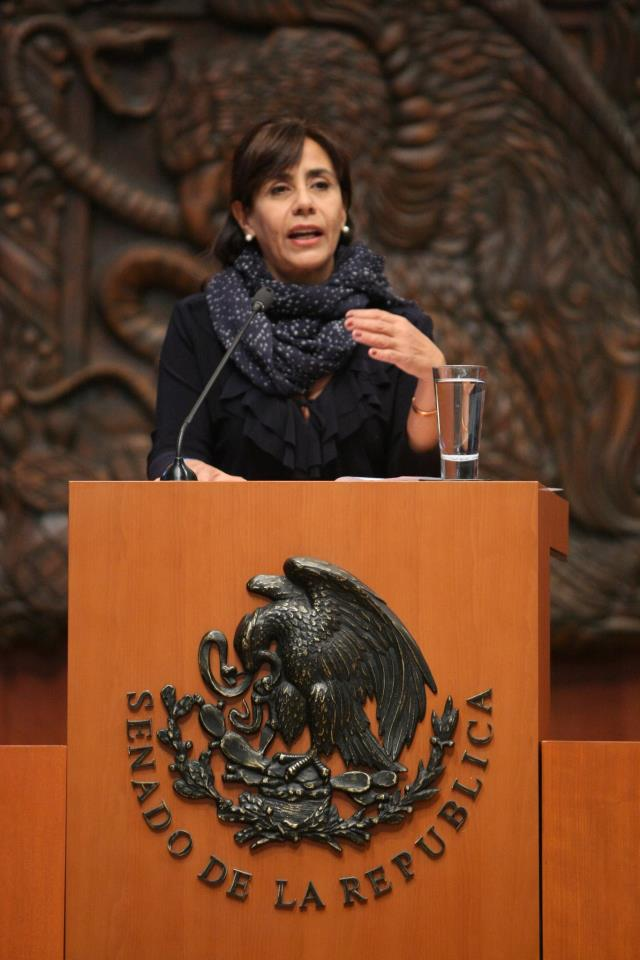 Sen. Calderón en la tribuna de la Cámara de Senadores